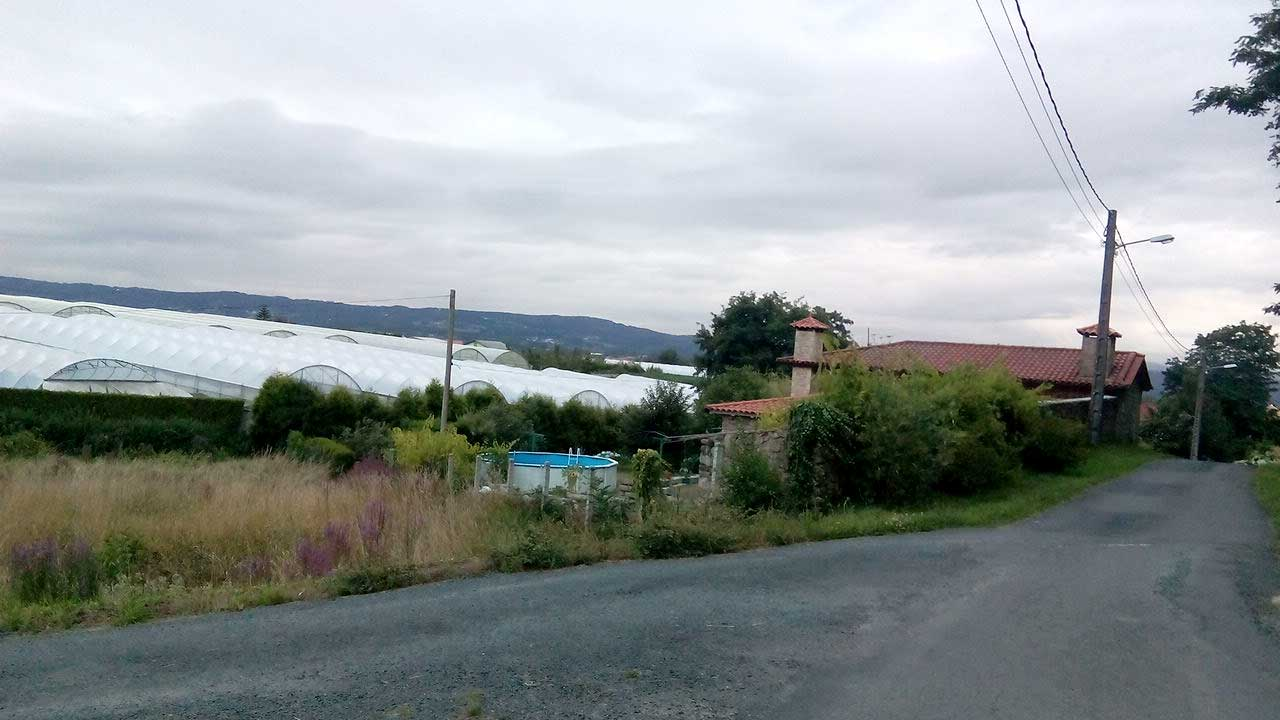 Vista de Pradedo, O Val.